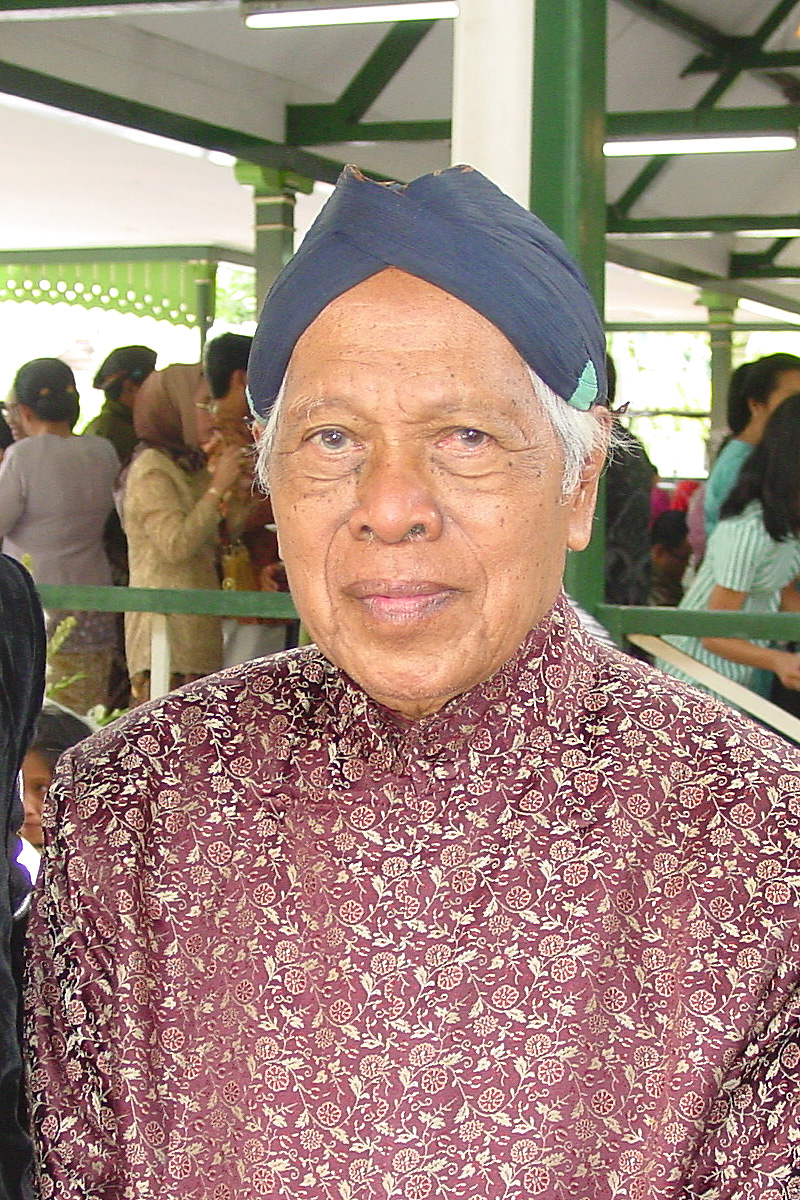 Selo Soemardjan in Yogyakarta, 8 September 2002